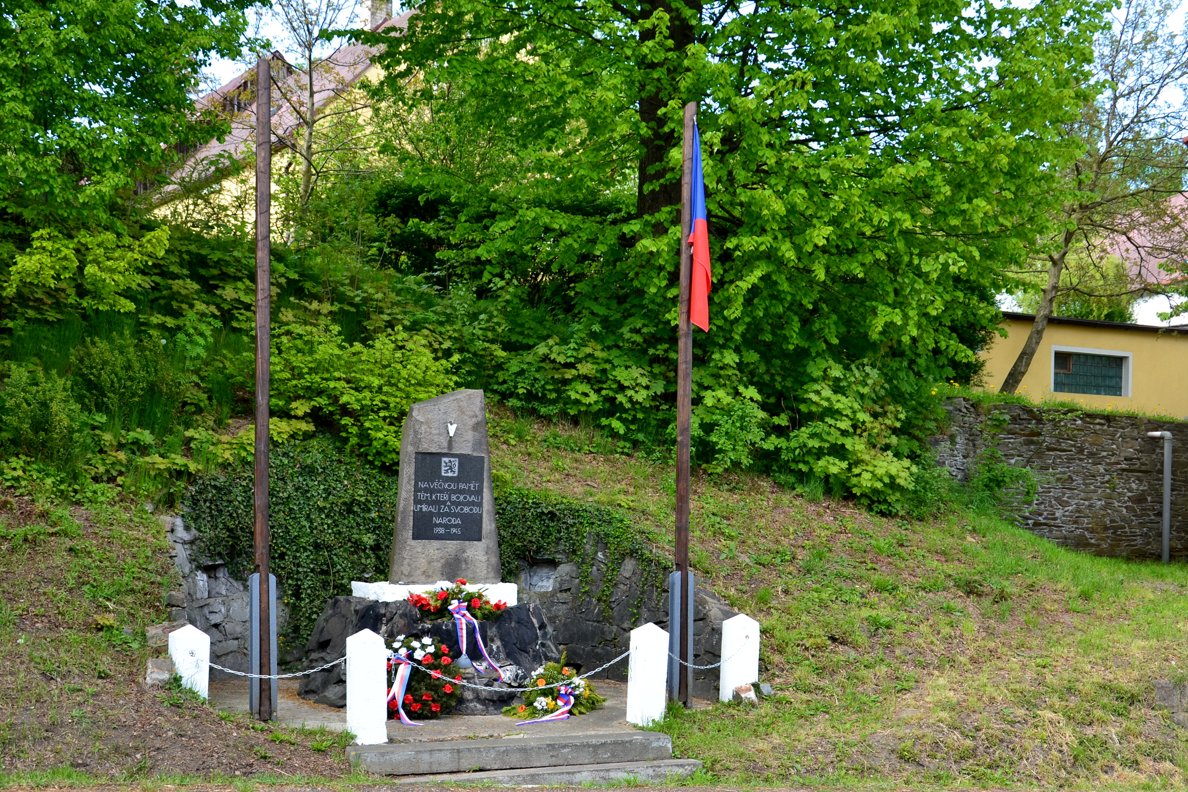 Pomník obětem druhé světové války